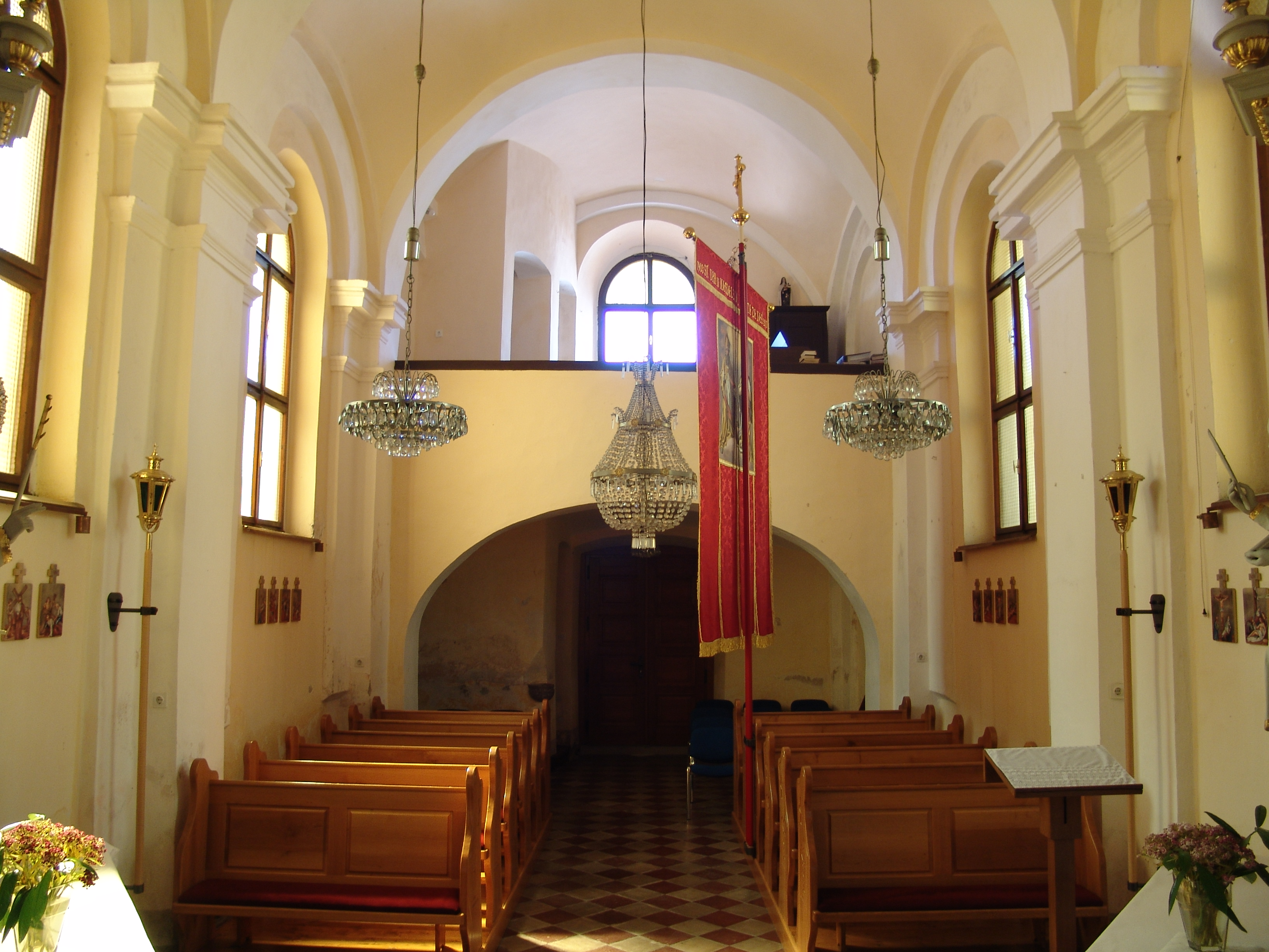 Pogled na ladjo ter kor cerkve sv. Urha iza glavnega oltarja